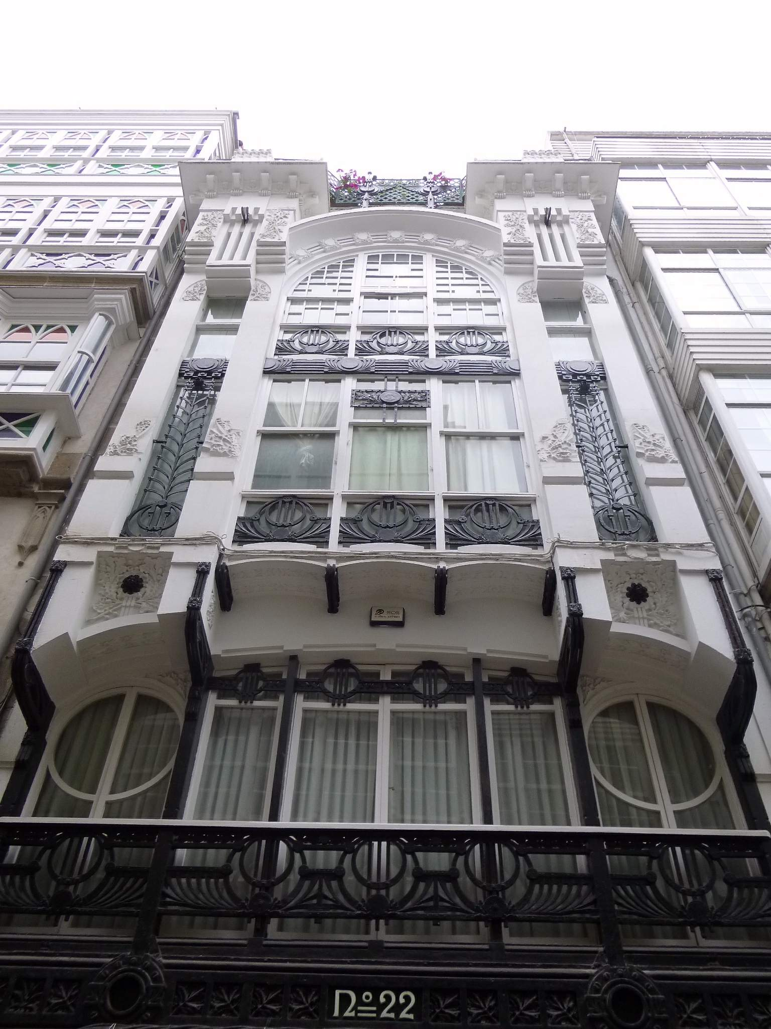 Paisaje urbano en A Coruña (Galicia, España)